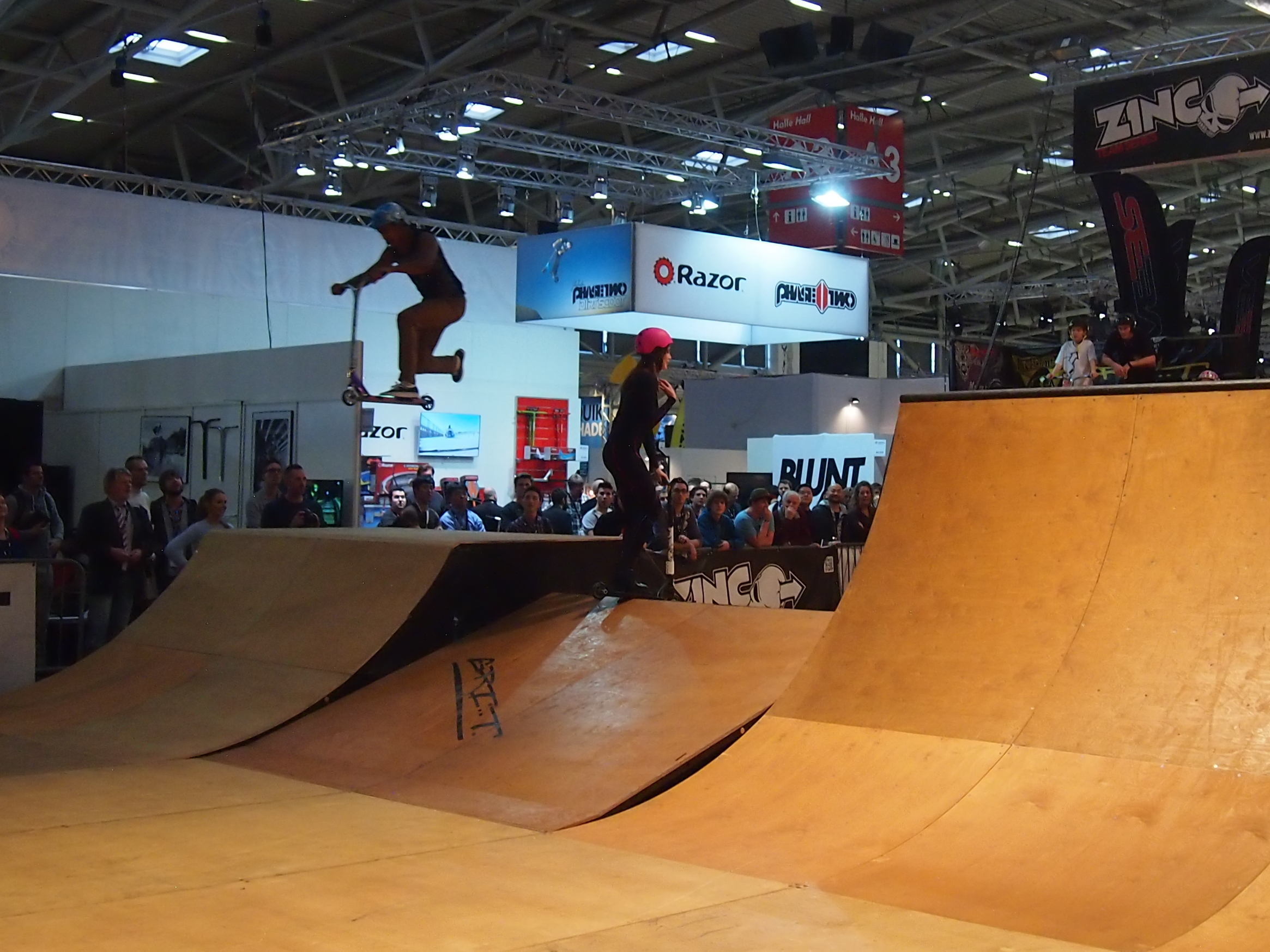 Scooter auf einer Halfpipe auf der ISPO 2014 in München